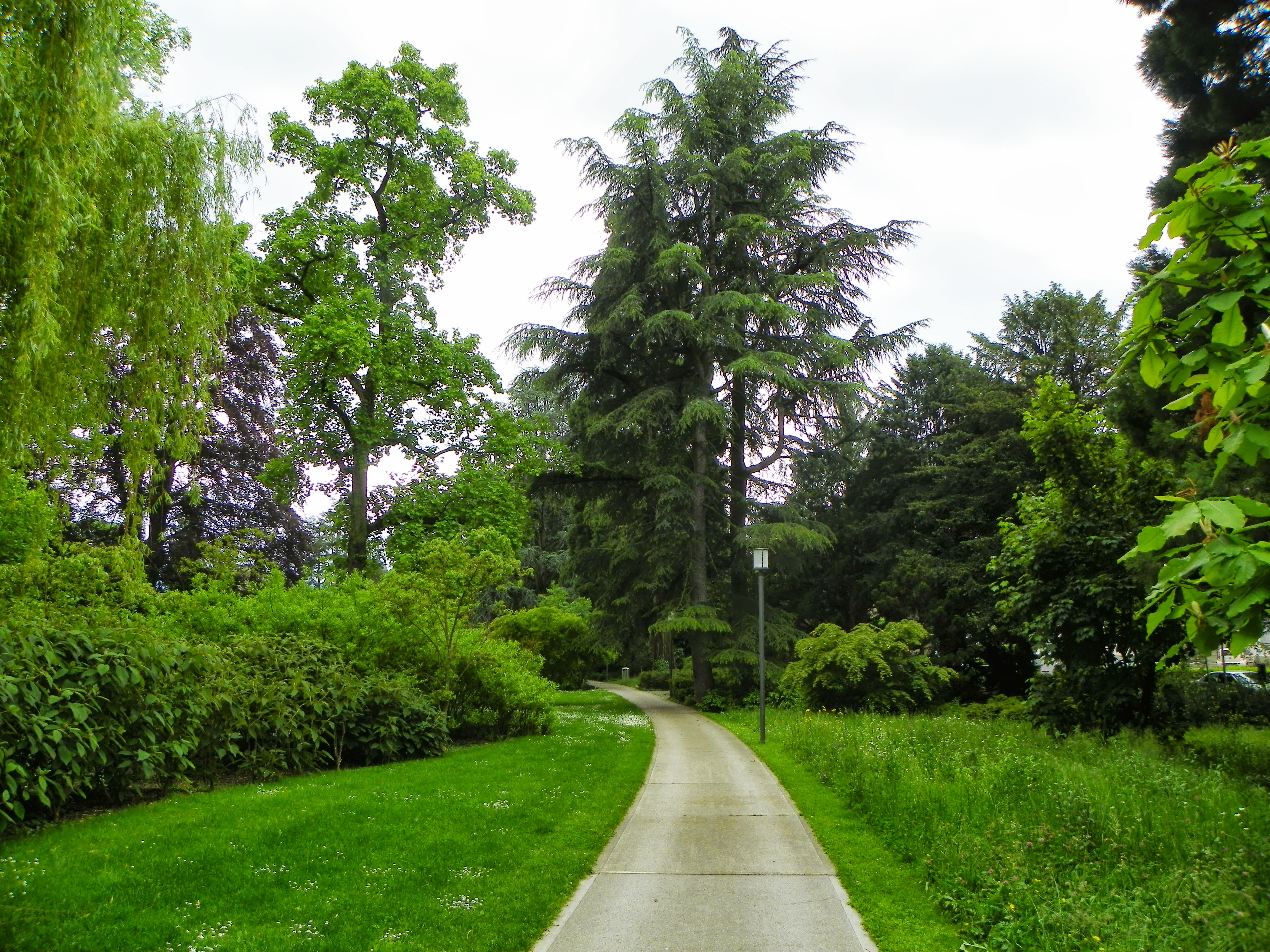 Kurpark in Baden, Schweiz